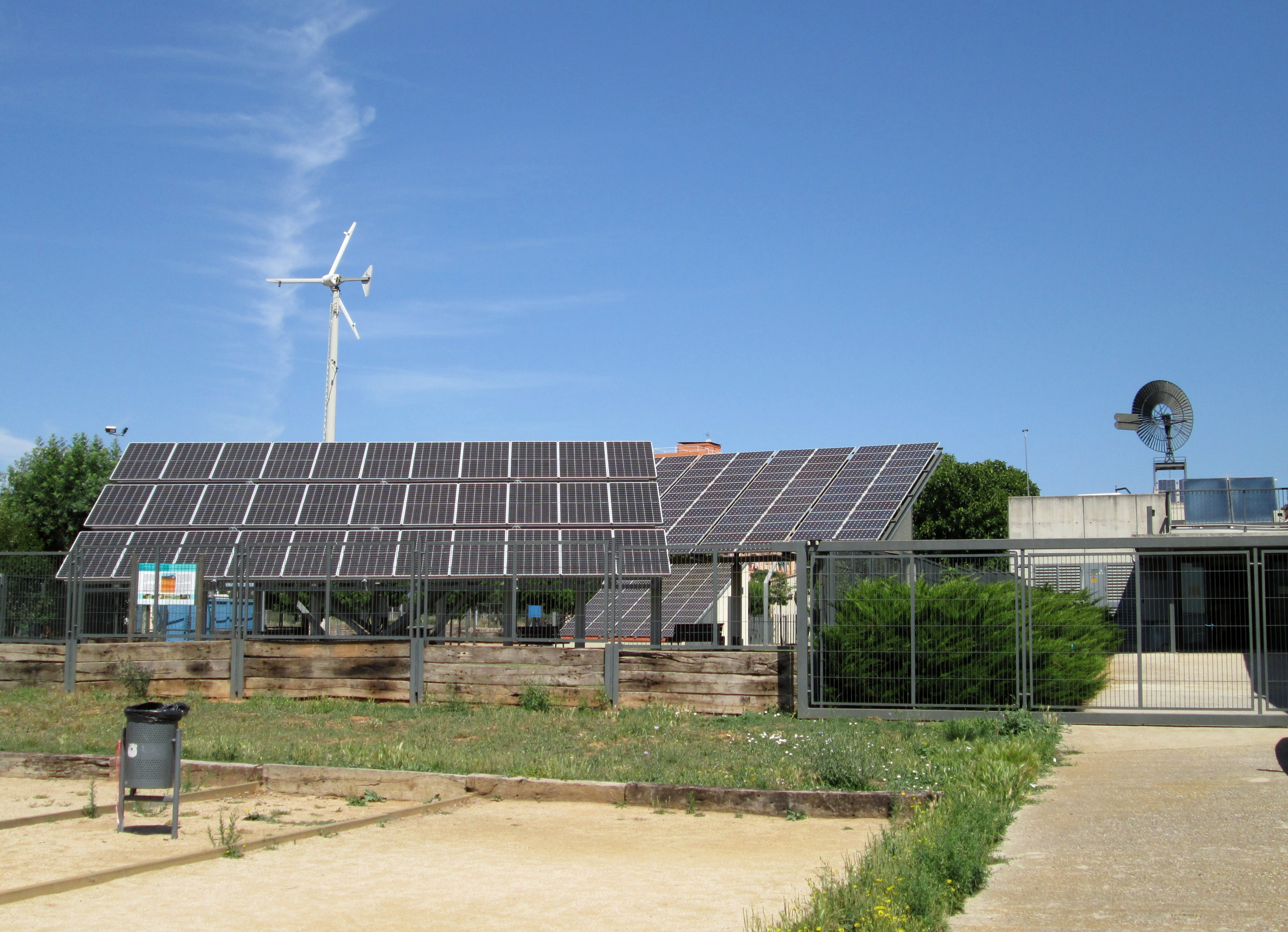 Centro de Divulgación Medioambiental, ubicado en la granja del Pas, en la calle Ramon Albó, 27, dentro del Parc Central del Vallès, en Sabadell, Barcelona (España).